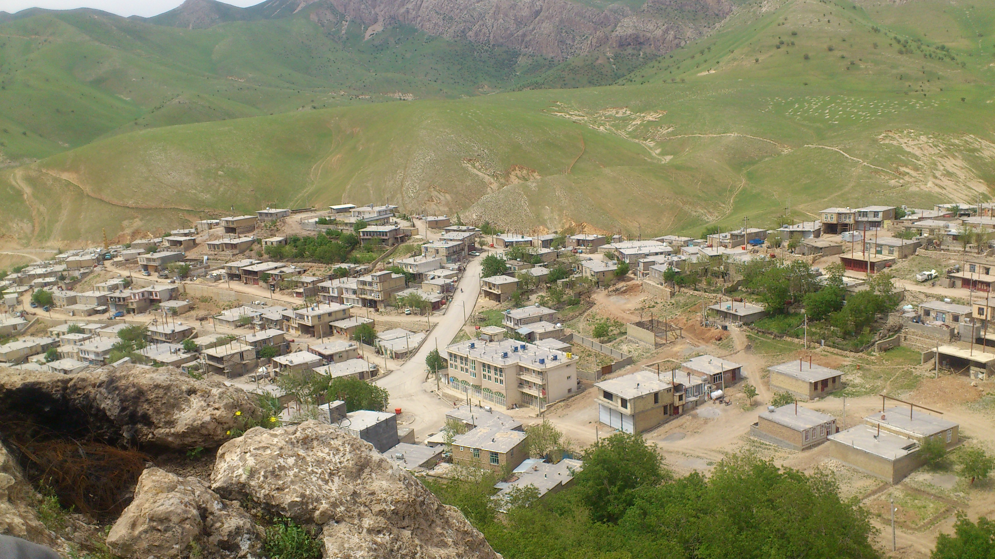 تصویری از شهر بانه‌­وره بر فراز هانه‌­سلیمان